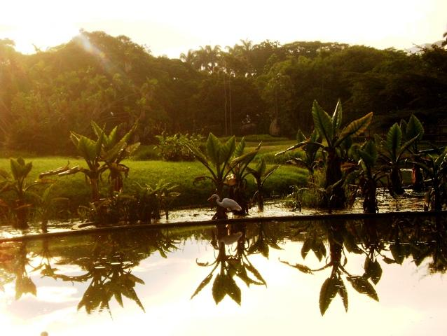 parque del este caracas venezuela